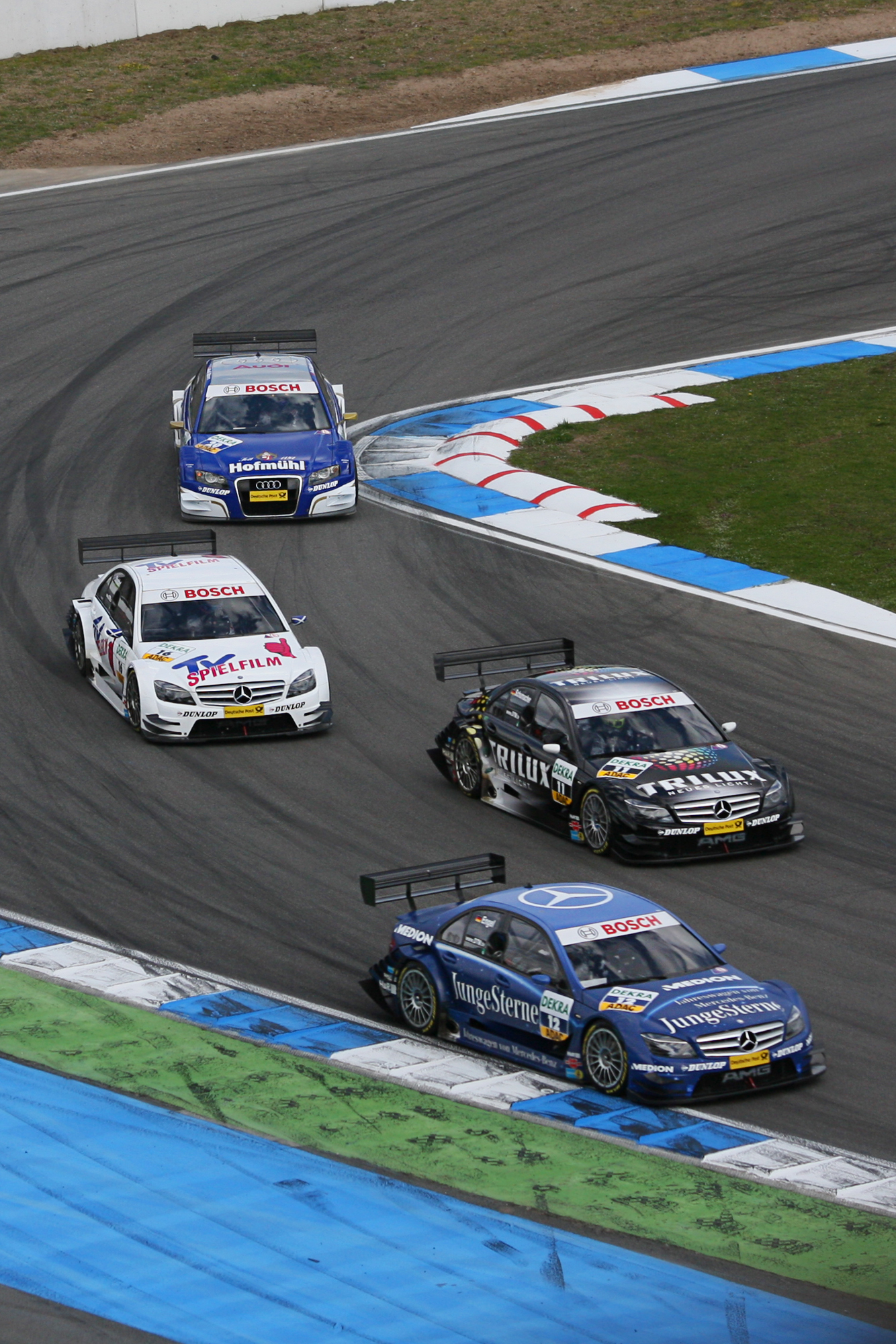 DTM race at the Hockenheim Ring#12 Maro Engel, #11 Ralf Schumacher, #16 Susie Stoddart and #20 Katherine Legge